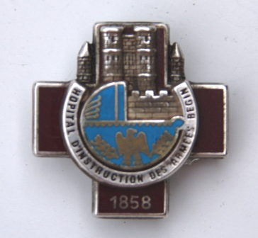 insigne de l'hôpiatl d'instruction des armées Bégin Saint Mandé 94160